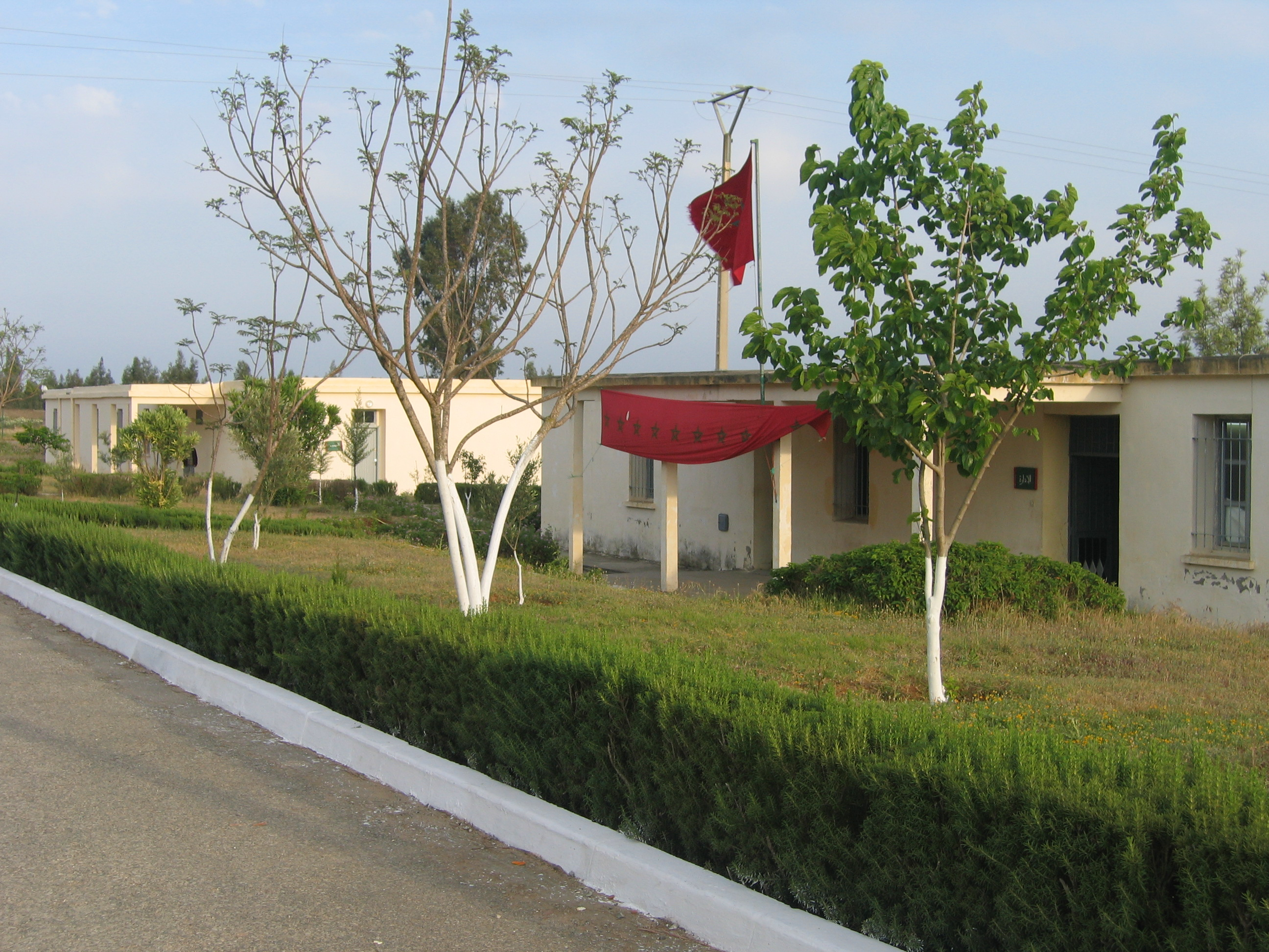 Centre de qualification agricole de Nouirat